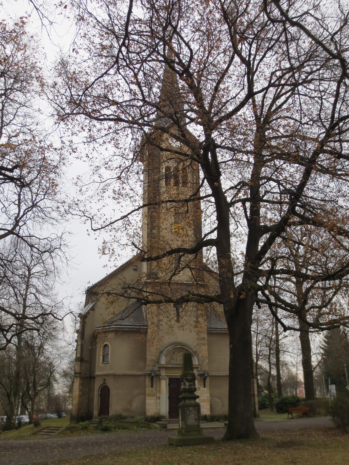 Ev.-Luth. Kirche Zinzendorf-Straße 16. Chemnitz Altendorf. Gedenkstein & Eiche, Deutsch/Franz. Krieg.